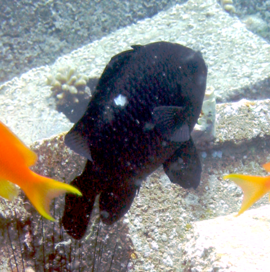 Dascyllus trimaculatus domino damsel Taba Egypt